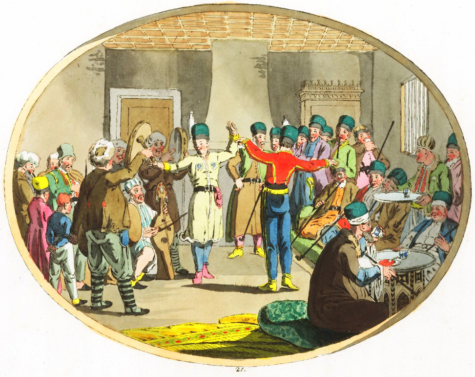 Народные развлечения крымских татар. Гравюра «Крым XVIII век. Обсуждение...» из цикла «Живописные описания обычаев, нравов и развлечений русских, татаров, монголов и других народов в Российской Империи»